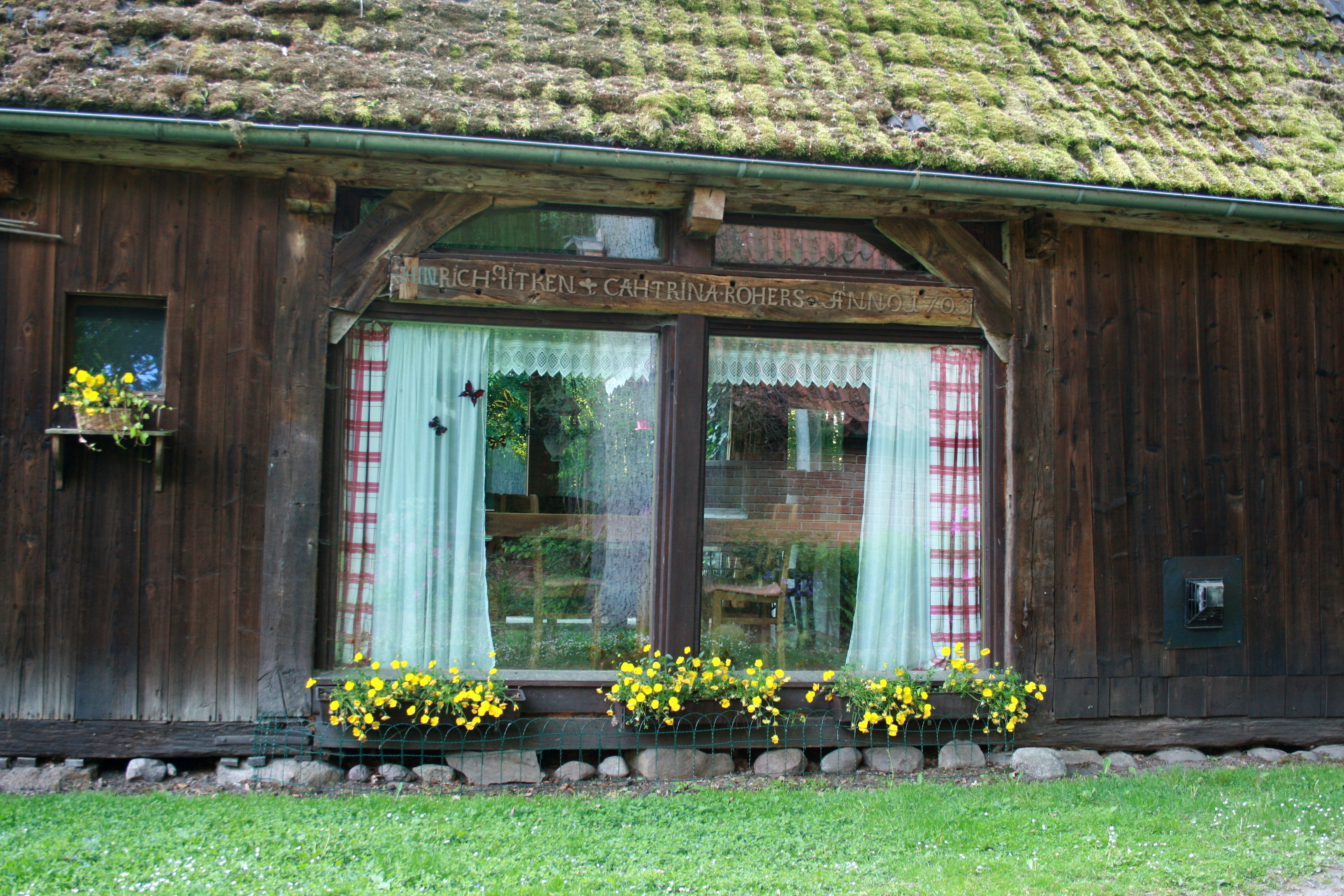 Hof Limbeck, Gilmerdingen in Neuenkirchen (Lüneburger Heide): Honighaus, zum gemütlichen Ferienhaus umgebauter Treppenspeicher von 1705